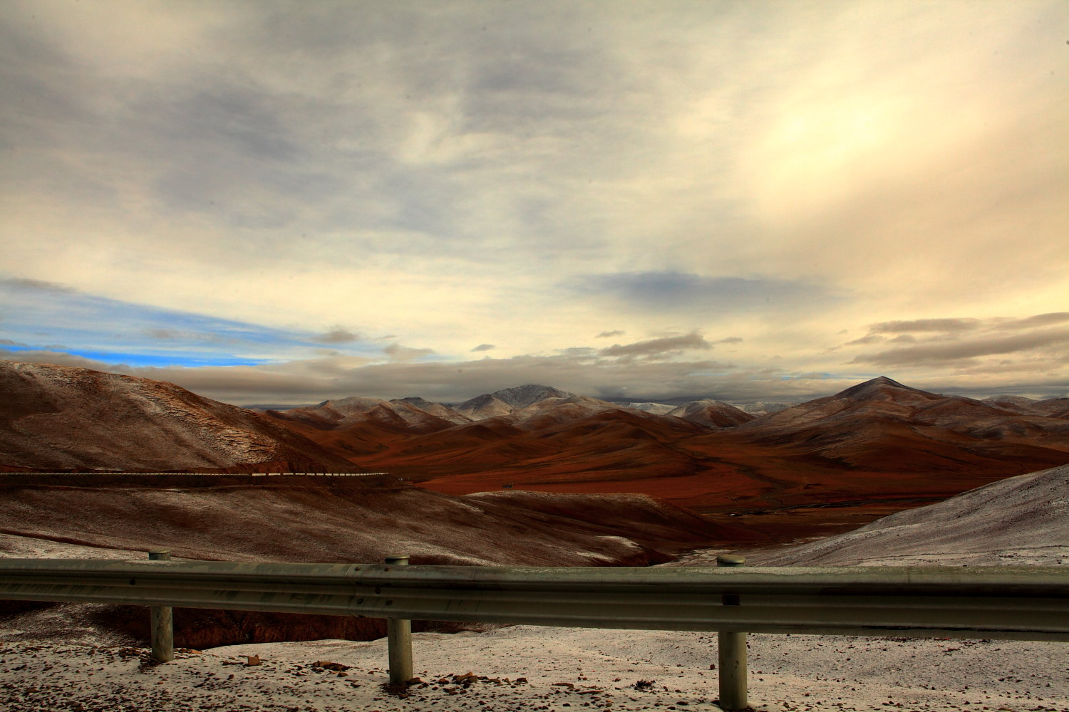 穿行在可可西里东部1【路人】